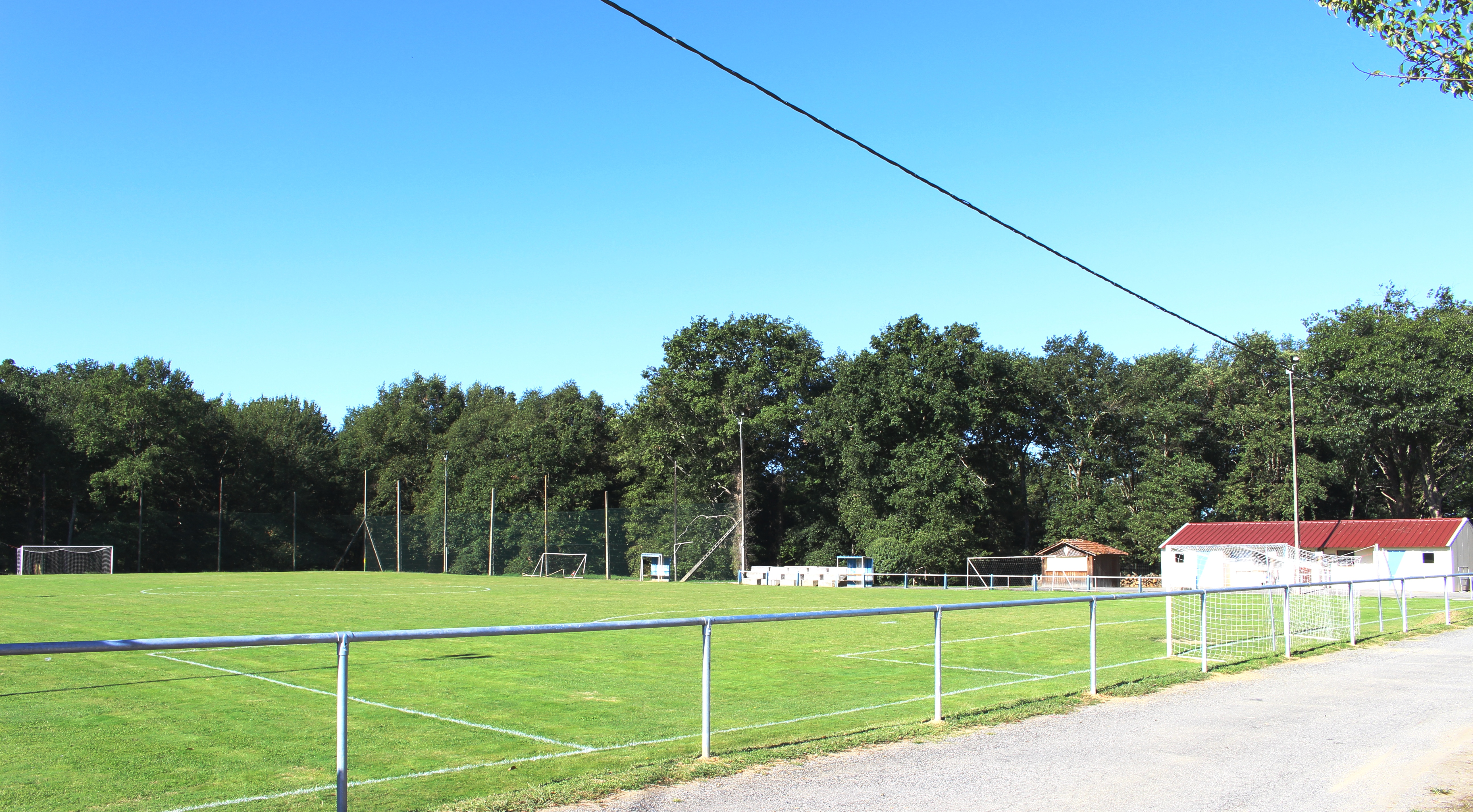 Stade de football de Guizerix (Hautes-Pyrénées)